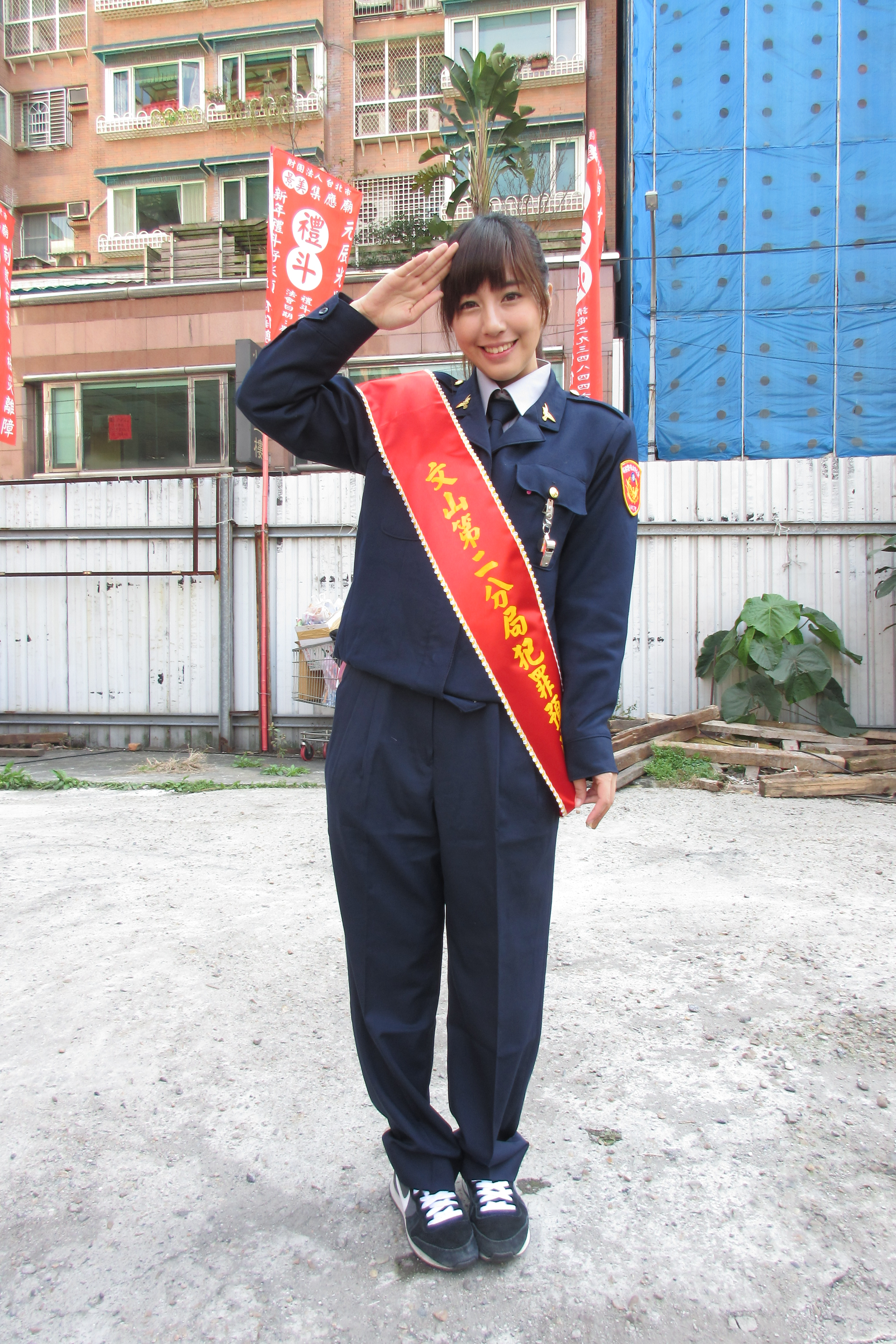 辜莞允 2015/02/14 臺北市政府警察局文山第二分局反詐騙宣傳活動 in 台北市景美集應宮